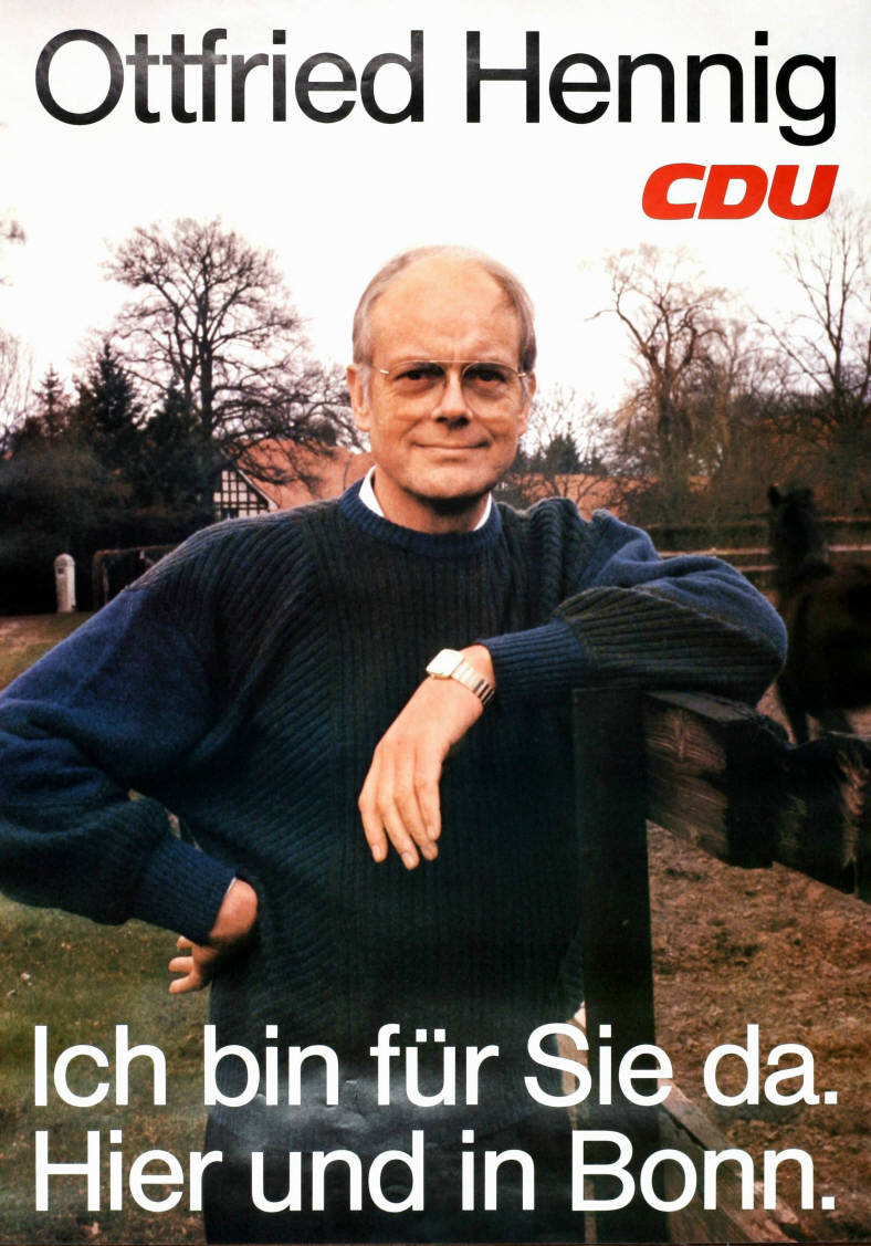 Ottfried Hennig CDU Ich bin für Sie da. Hier und in Bonn. Abbildung: Hennig am Pferdezaun vor seinem Haus (Foto) Kommentar: Datierung unsicher, evtl. auch 1990? Plakatart: Kandidaten-/Personenplakat mit Porträt Objekt-Signatur: 10-001 : 3001 Bestand: Plakate zu Bundestagswahlen (10-001) GliederungBestand10-18: Plakate zu Bundestagswahlen (10-001) » Die 11. Bundestagswahl am 25. Januar 1987 » CDU » Mit Porträtfoto Lizenz: KAS/ACDP 10-001 : 3001 CC-BY-SA 3.0 DE